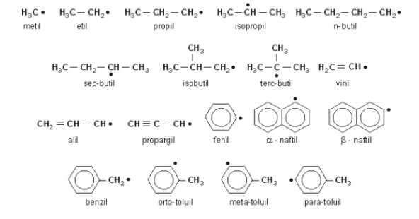 Figura pro trabalho